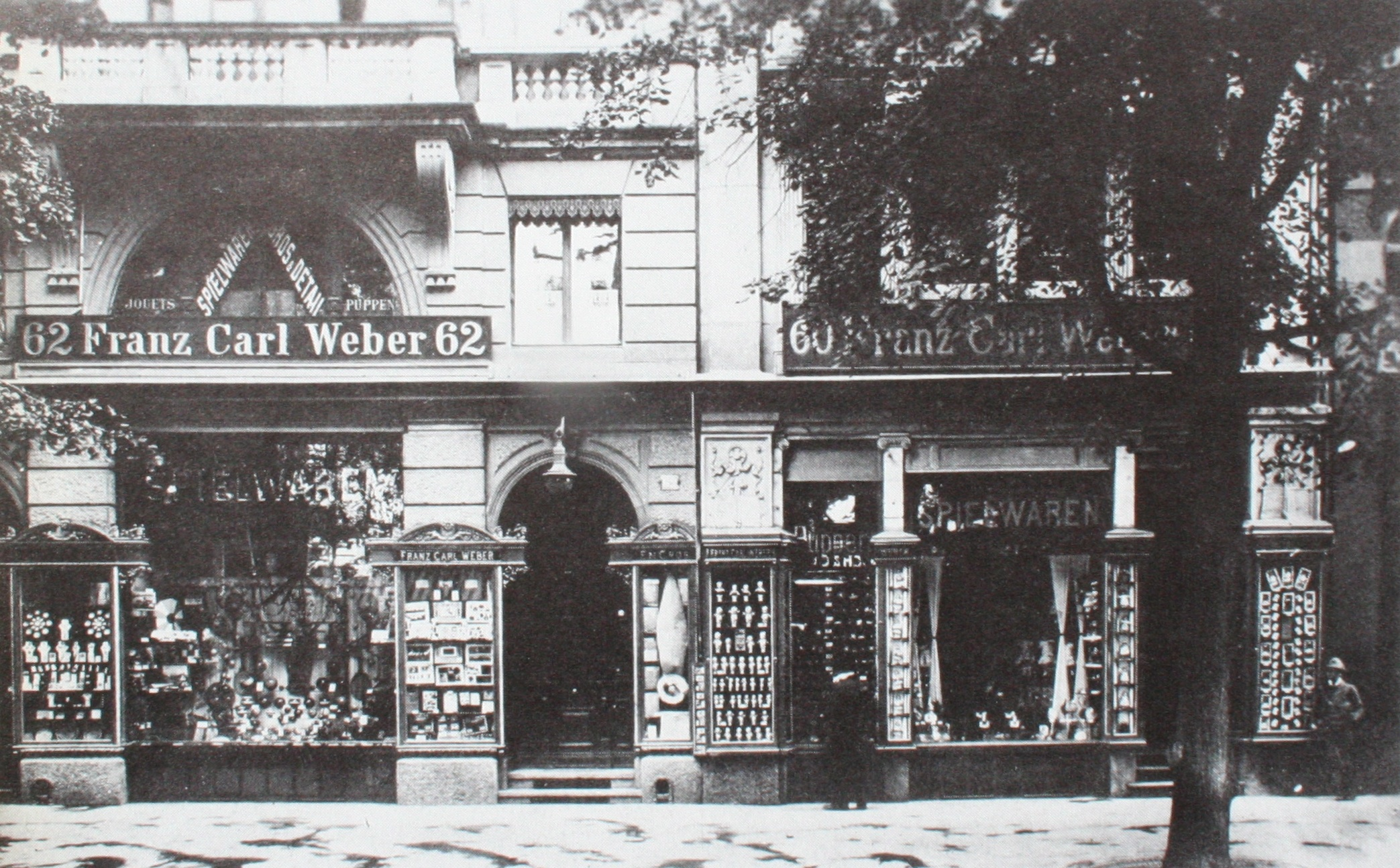 Spielwarenhandlung Franc Carl Weber um 1910